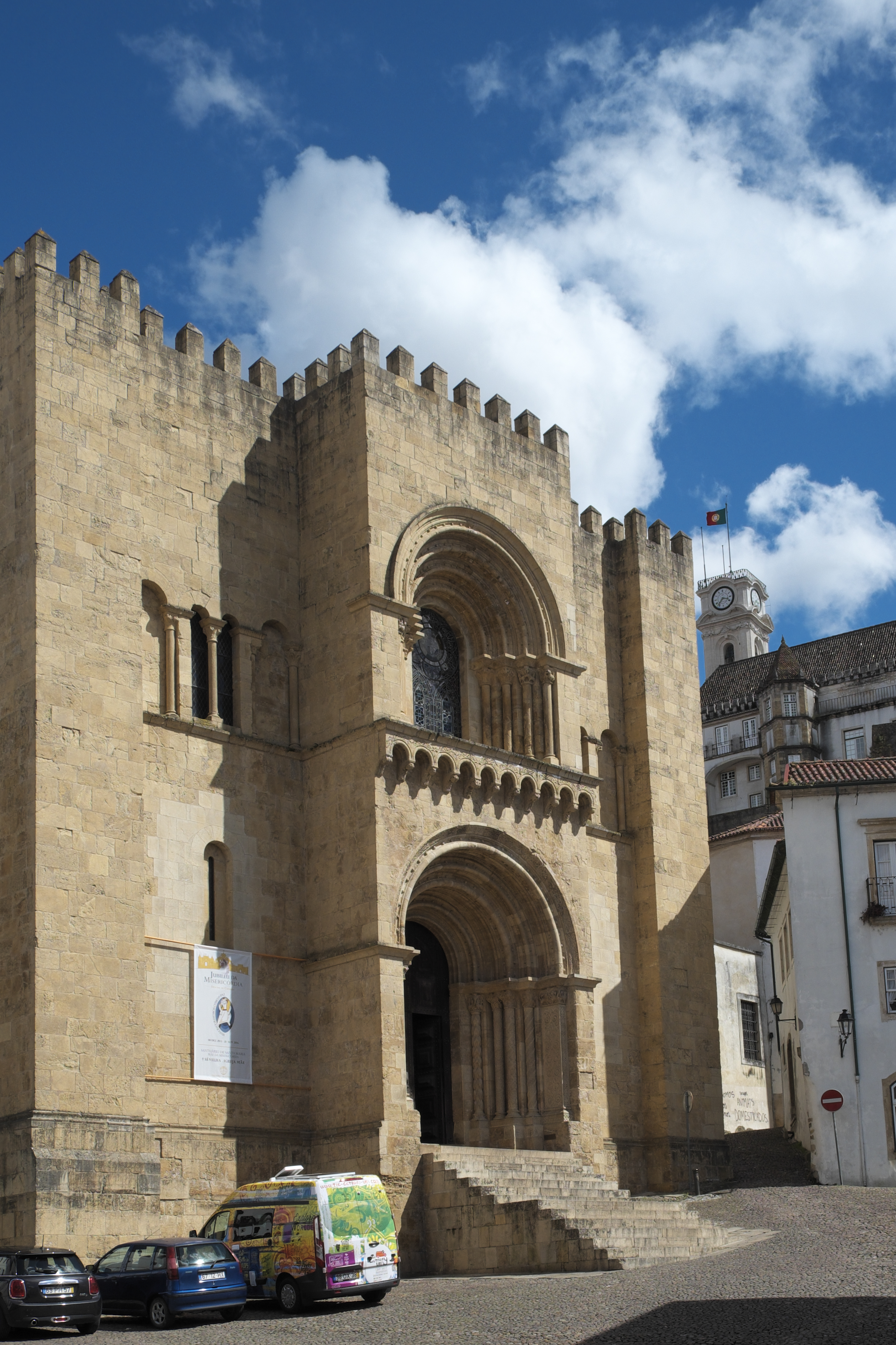 Alte Kathedrale Sé Velha in Coimbra in Portugal, Westfassae mit Hauptportal